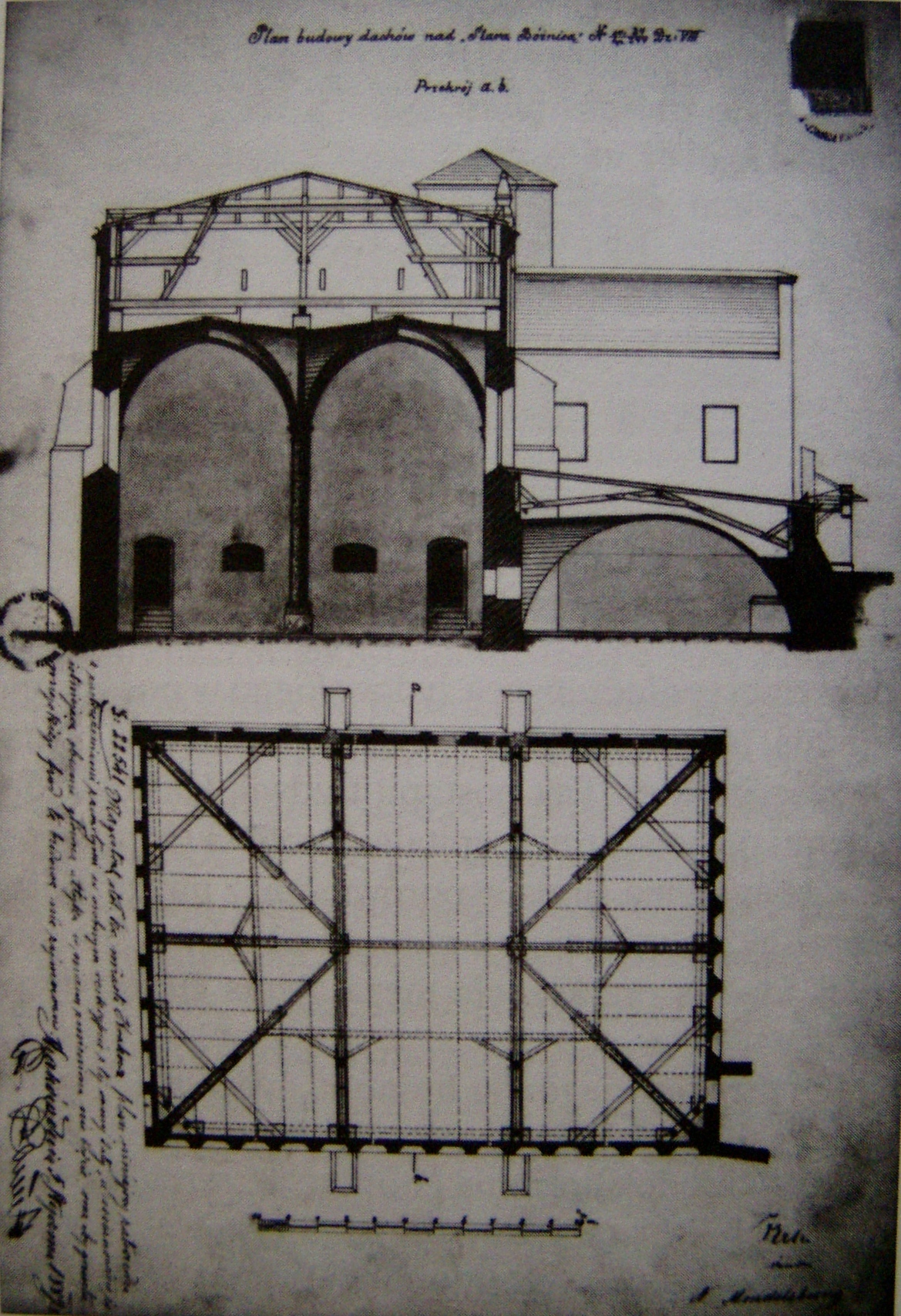 Projekt przebudowy Starej Synagogi w Krakowie